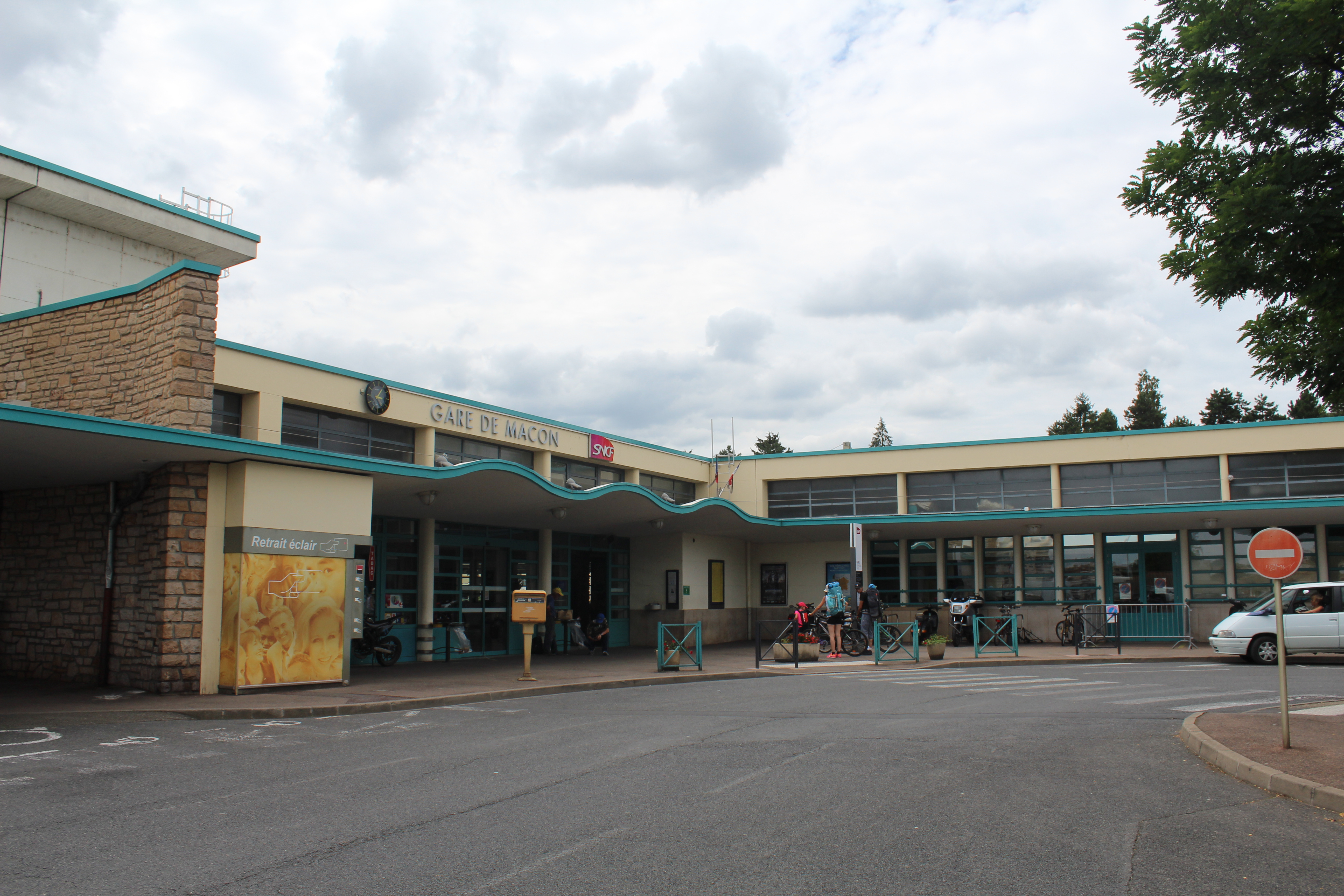 Entrée de la gare de Mâcon-Ville.